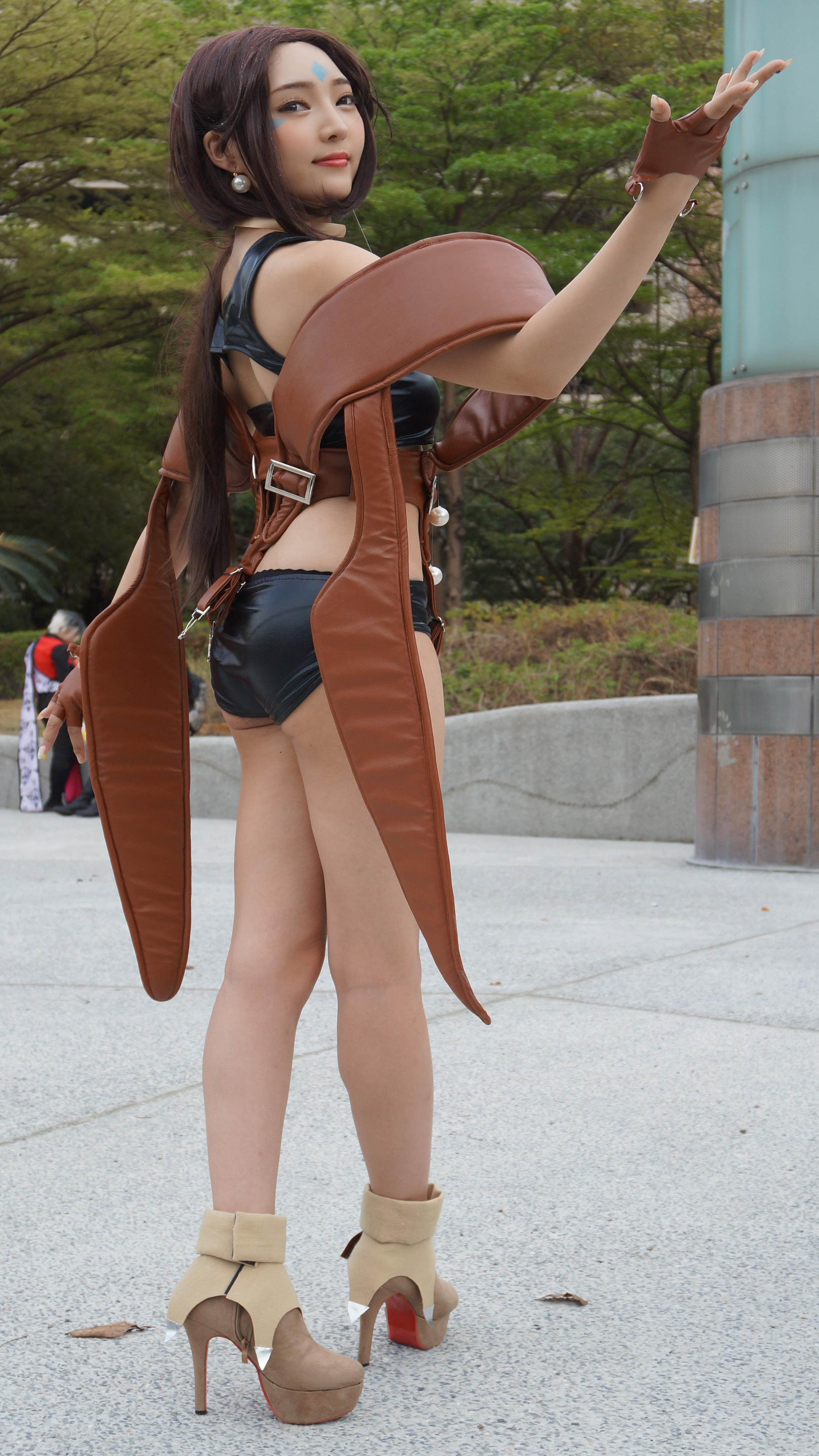 第29屆台灣同人誌販售會高雄場，《幸運女神》佩歐絲cosplayer。